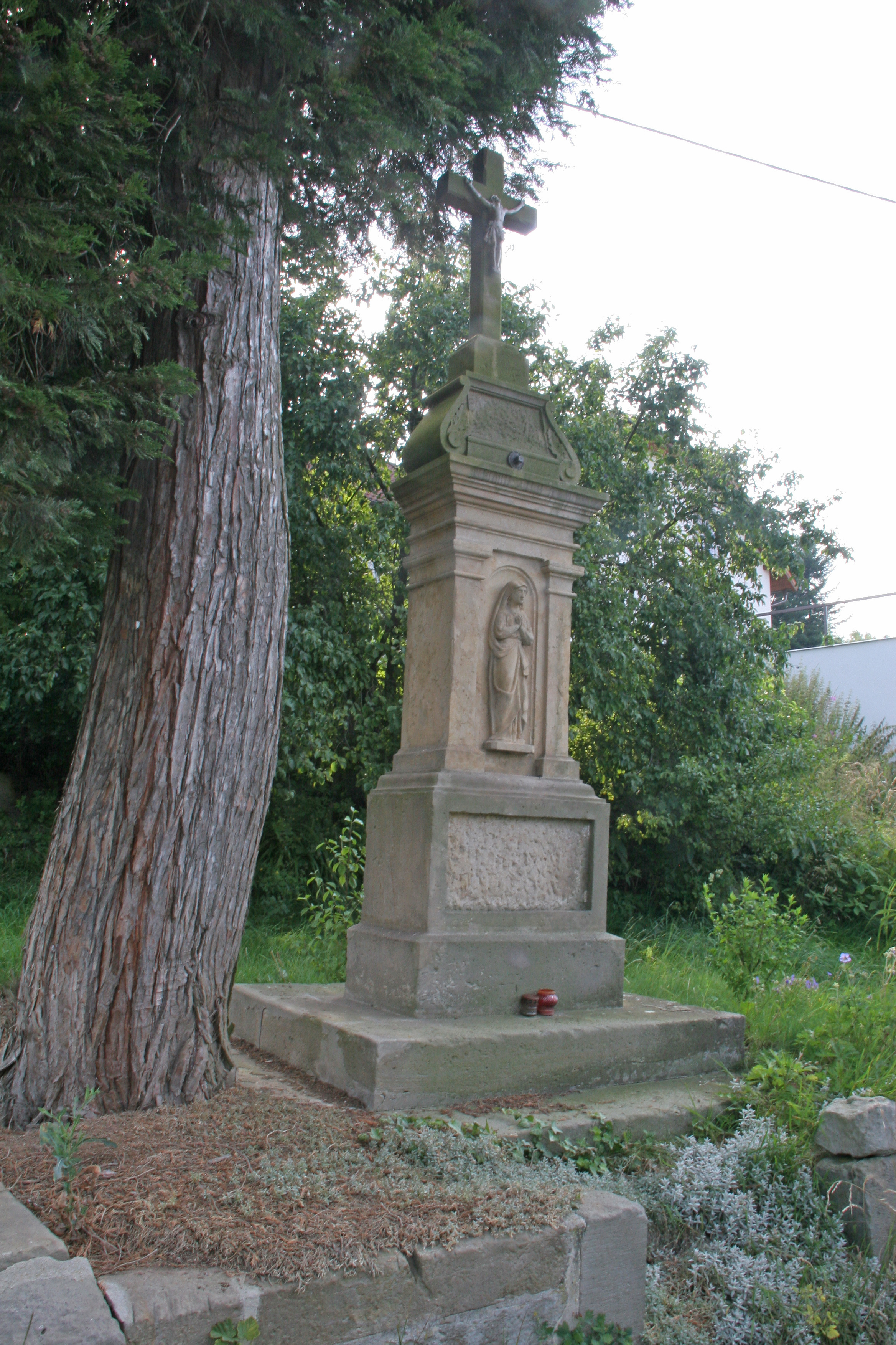 Kašov křížek